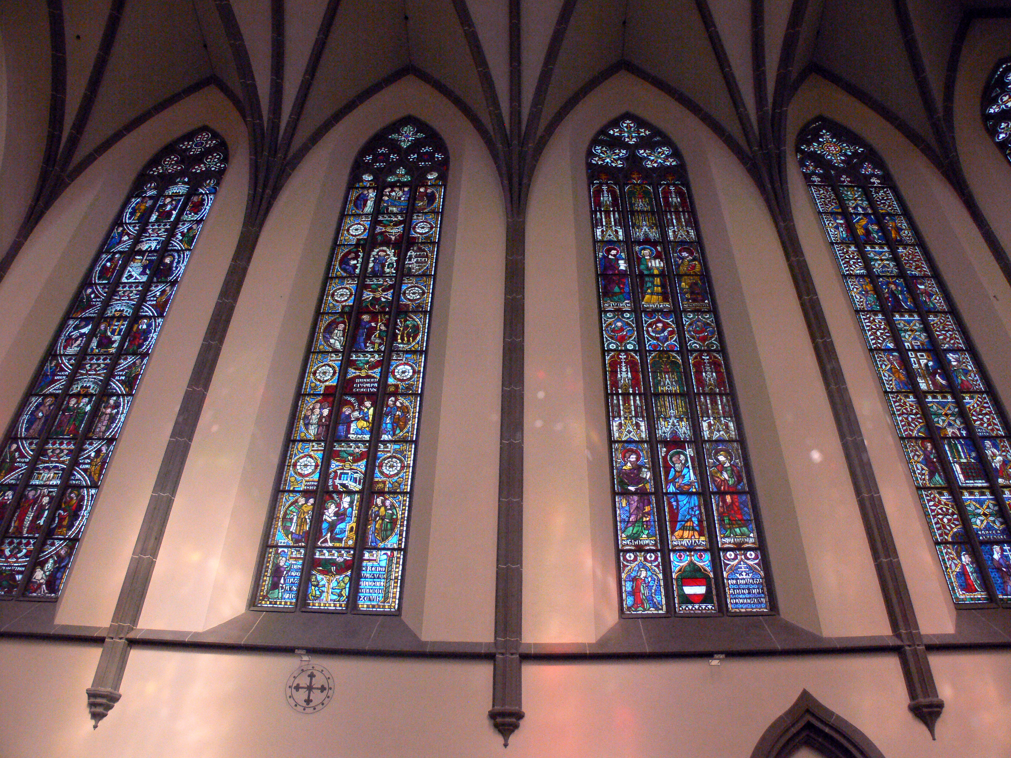 Windisch. Kirche des früheren Klosters Königsfelden.